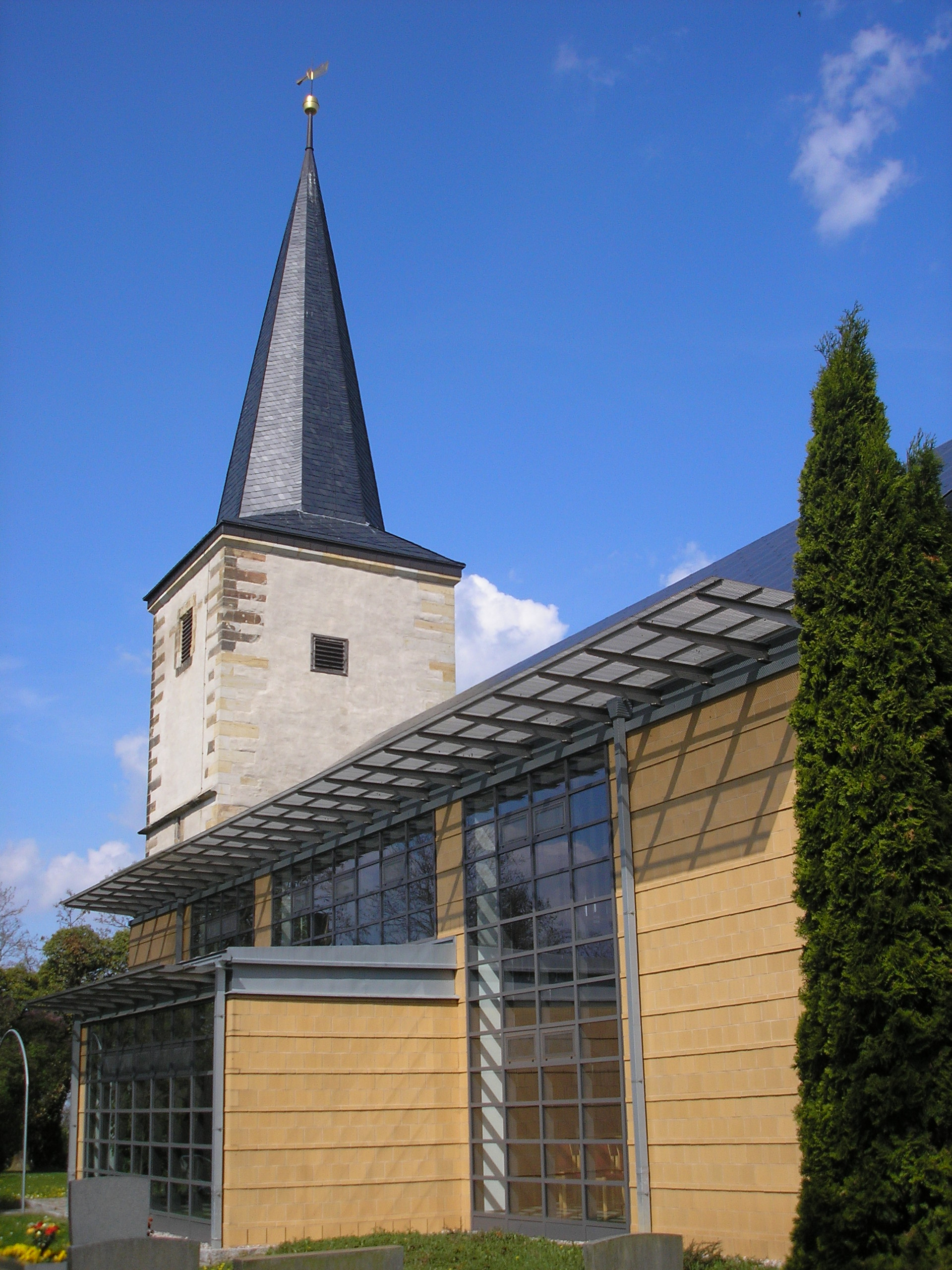 Die Kirche von Riethnordhausen (Thüringen).